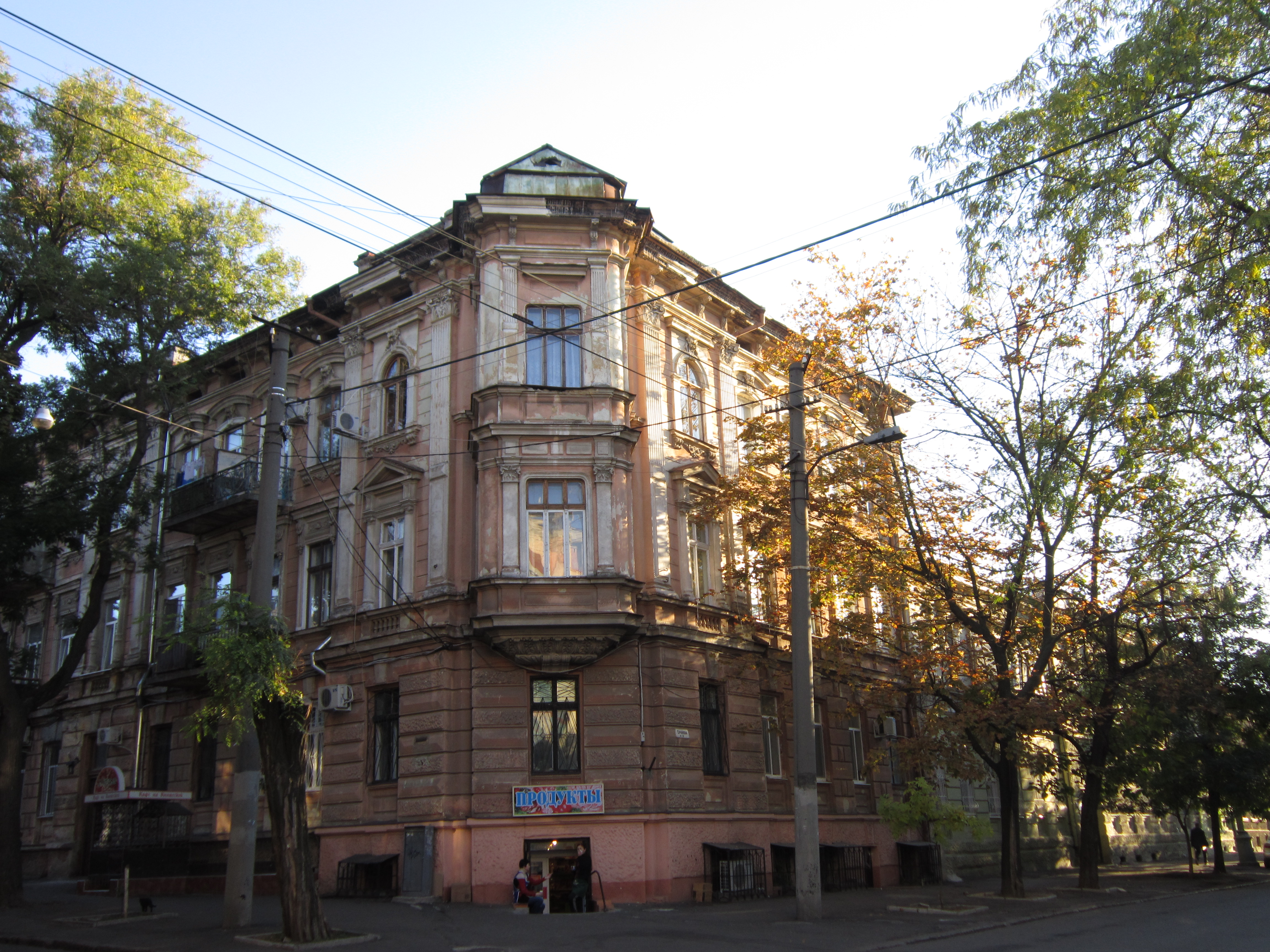 Будинок житловий Ашкіназі,в якому жили:- Ф.Г. Яновський - академік АН УРСР;- В.Ф. Каган - математик, з.д.н. РРФСР, лауреат Держ.премій СРСР, професор;- В.Ф. Алексєєв - літературознавець, академік АН СРСР;- на 1-му поверсі якого містилась редакція журналу «Вестник винодела», головним редакторм якого був проф. В.Е. Таіров та журнал «Опытная физика и элементарная математикая», Одеса, Князівська вул., 6 / пров. Сеченова, 5